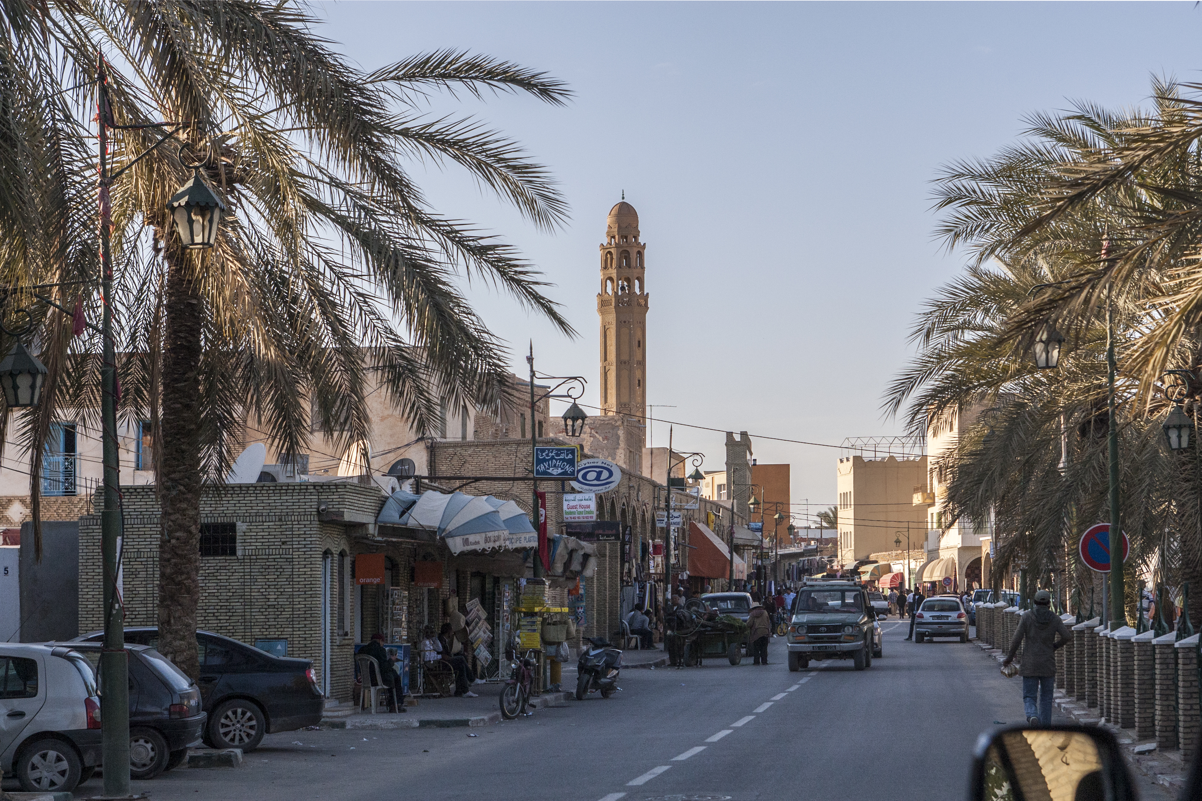 Tauzar. Plantacja palm daktylowych w oazie.